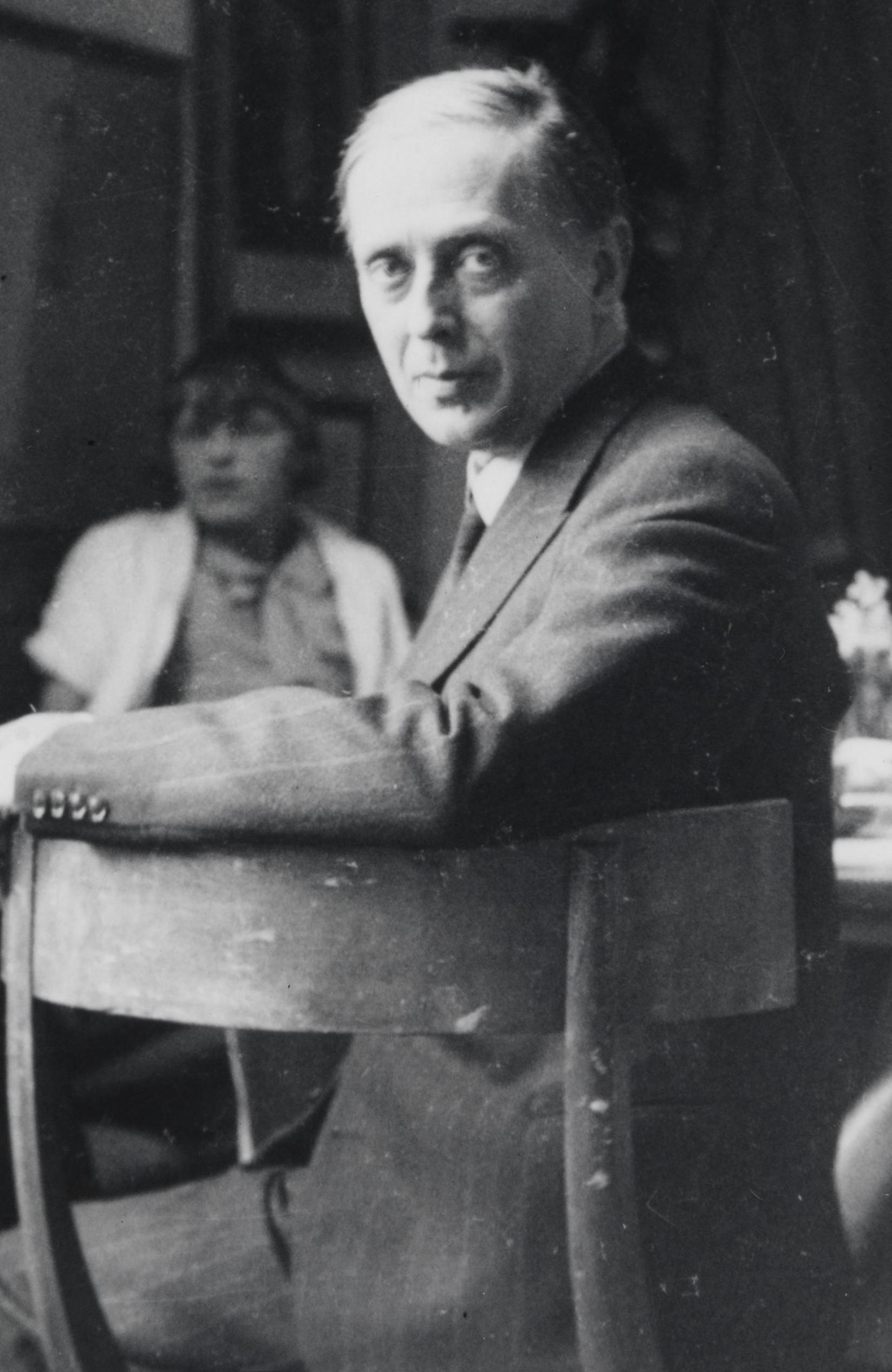 Bildet er hentet fra Nasjonalbibliotekets bildesamling Depicted person: Valen, Fartein